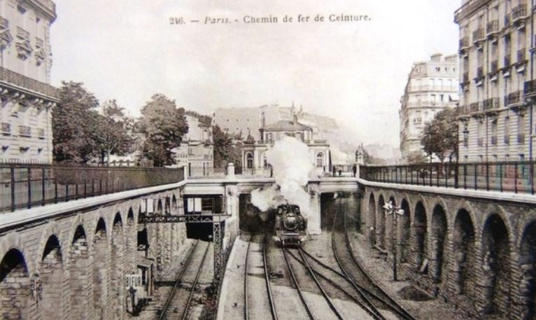 Paris, chemin de fer de ceinture